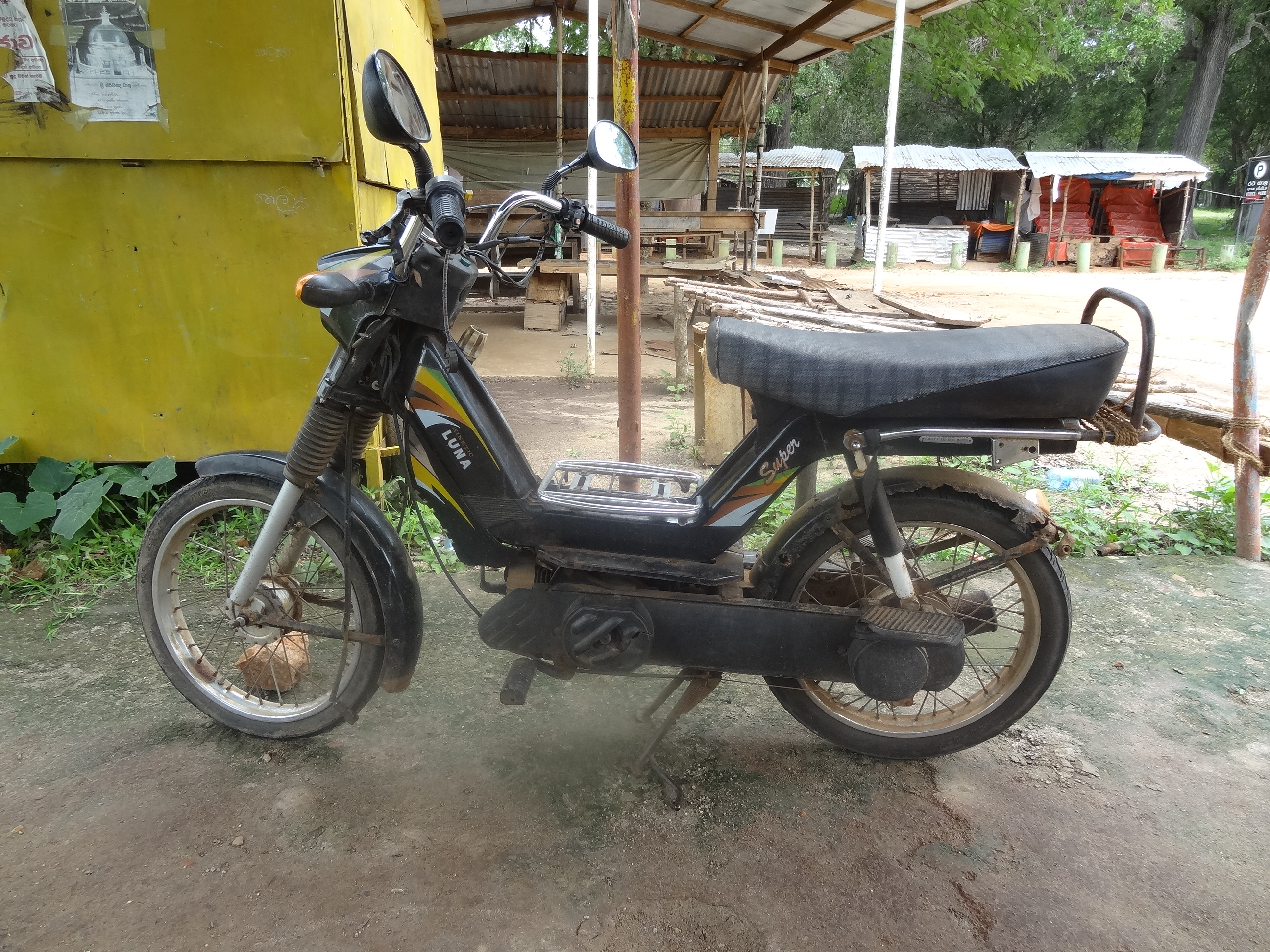 Kinetic Luna Super